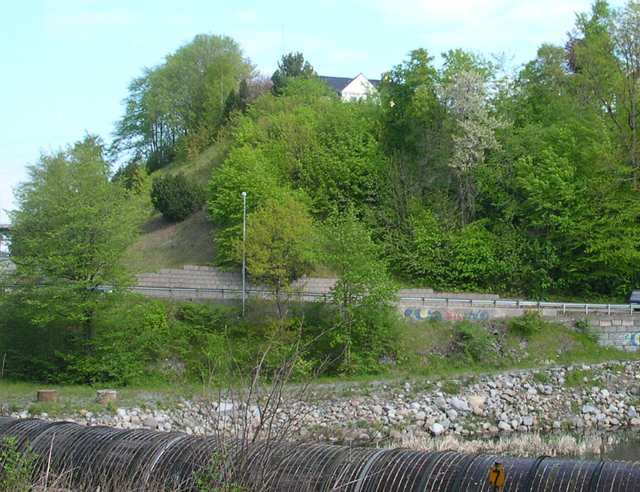 Trudvang i Larvik, Farriselva i forgrunnen